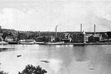 Gustavsbergs porslinsfabrik vid 1800-talets slut